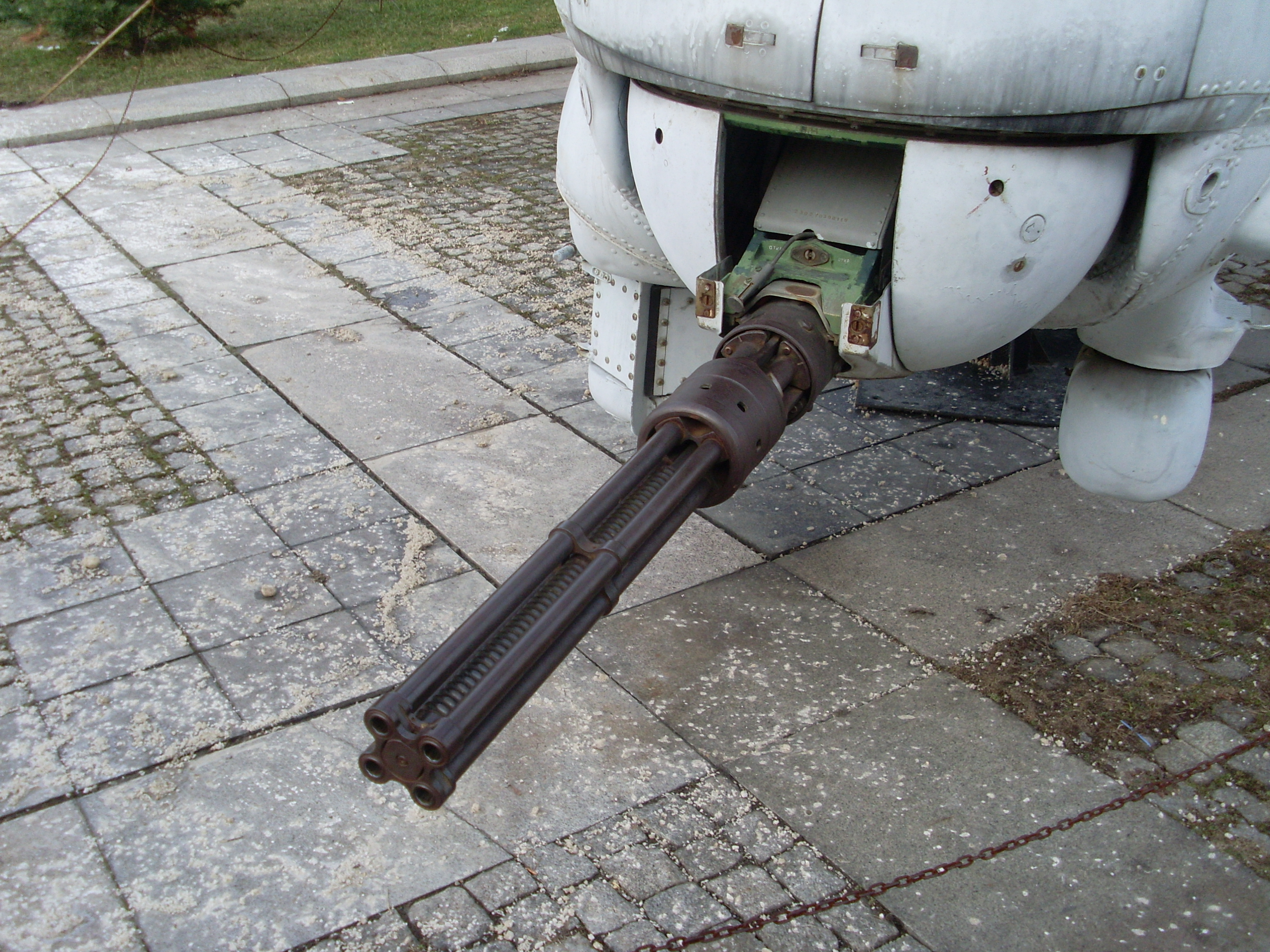 Mil Mi-24, cañón delantero, Museo Nacional de Bulgaria, marzo de 2011